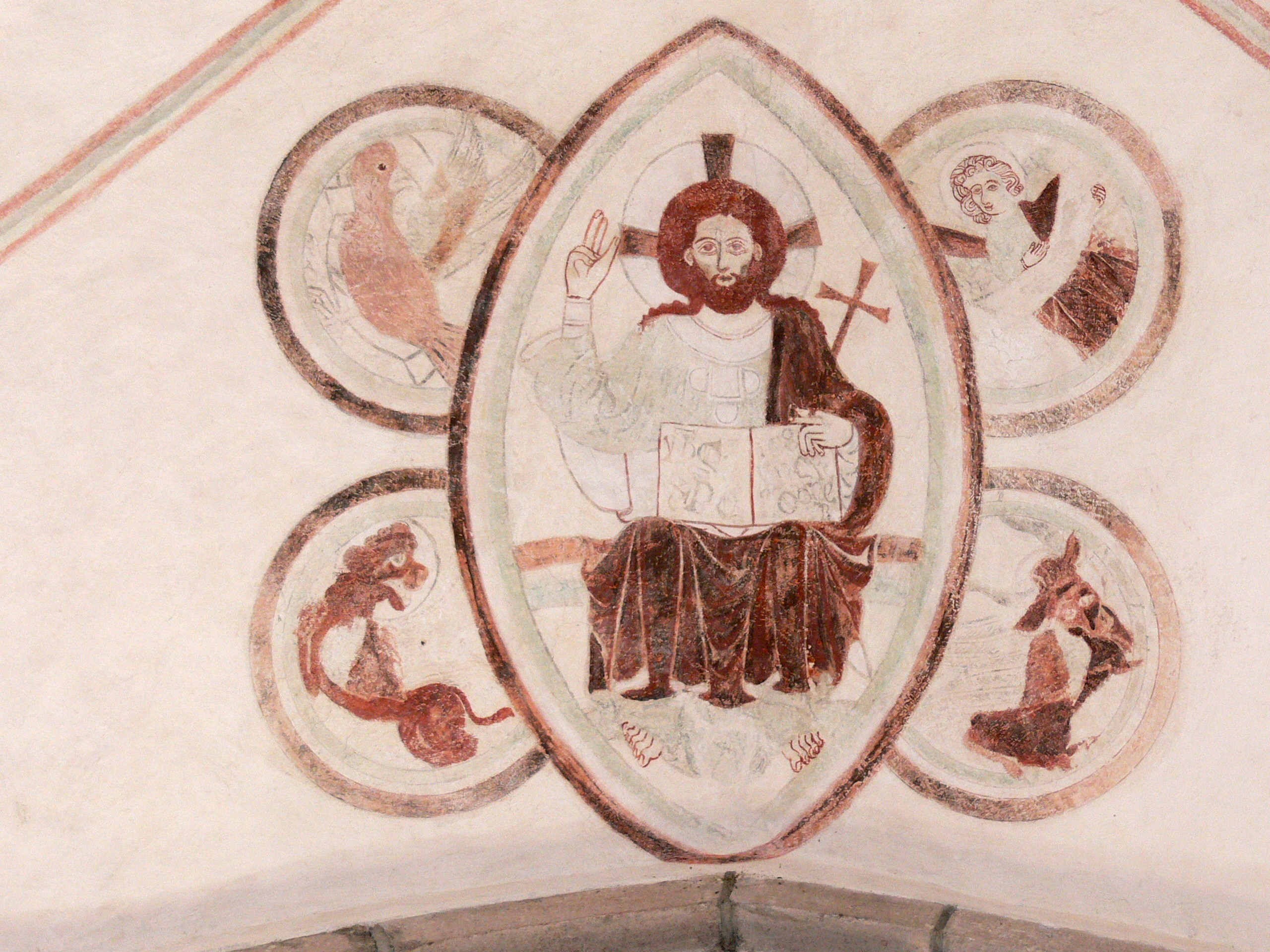 Grötlingbo Kyrka auf Gotland. Wandmalerei: Christus in der Mandorla mit Evangelistensymbolen